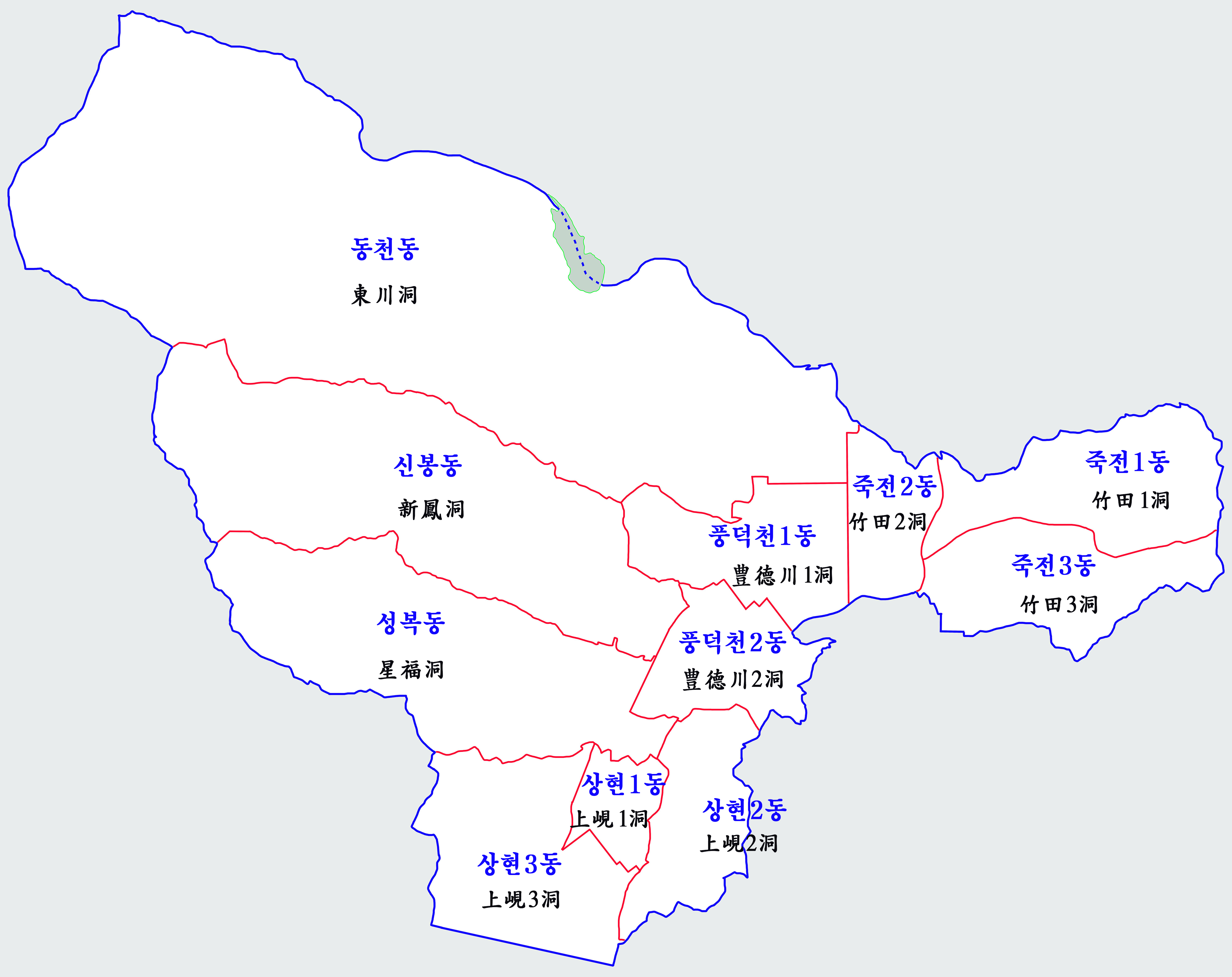 용인시 수지구 행정구역도